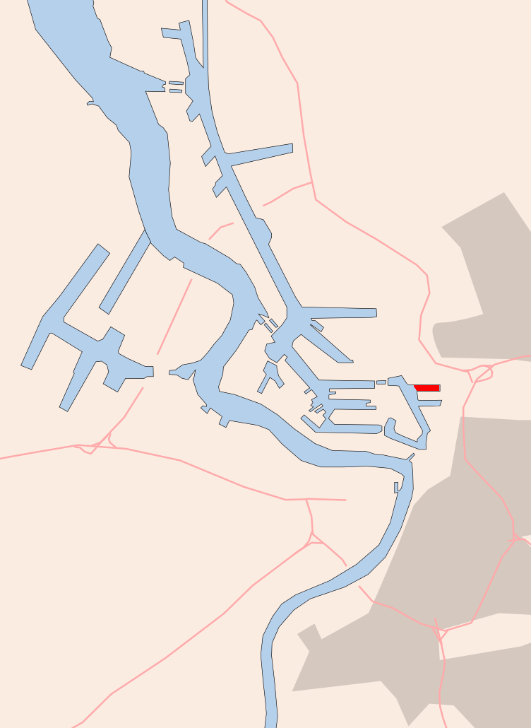 Antwerp , Derde Havendok